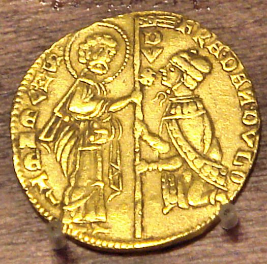 Francesco Dandolo Gold Coin